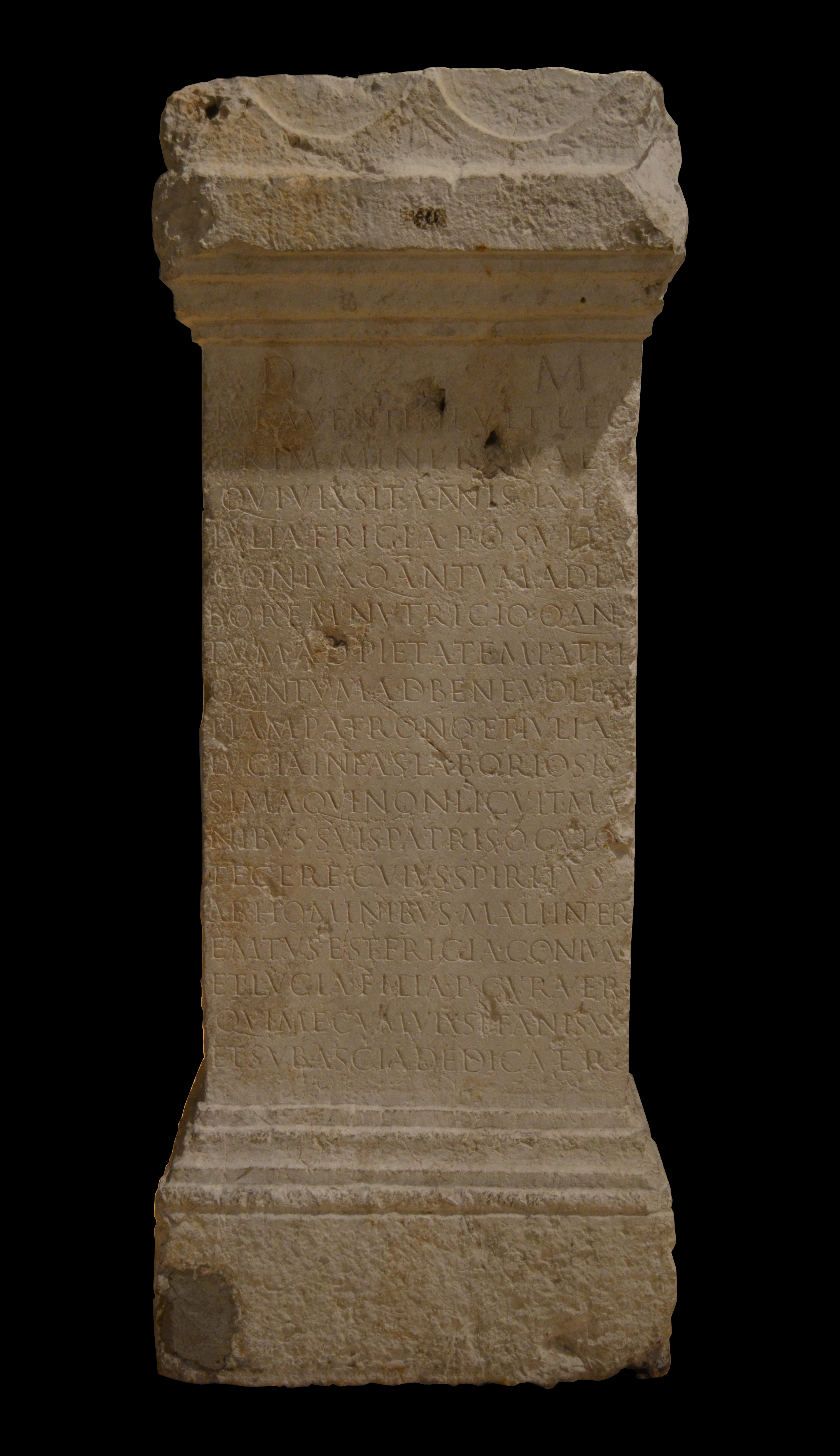 Musée gallo-romain de Fourvière (Lyon) - Cippe avec base et couronnement découvert en mars 1875 à Trion (Lyon), dans les travaux de terrassement pour l'établissement de la gare de Trion du chemin de fer de Lyon à Saint-Just. Haut. 155 cm ; larg. 50 cm. D(iis) M(anibus) / Iul(i) Aventini vet(erani) leg(ionis) / Prim(ae) Minerv(i)ae / qui vixsit annis LXI / Iulia Frigia posuit / coniux q(u)antum ad la/borem nutricio q(u)an/tum ad pietatem patri / q(u)antum ad benevolen/tiam patrono et Iulia / Lucia infa(n)s laboriosis/sima qui non licuit Ma/nibus suis patris oculos / tegere cuius spiritus / ab hominibus mali(s) inter/em(p)tus est Frigia coniux / et Lucia filia p(onendum) curaver(unt) / qui mecum vixsit an(n)is XX / et sub ascia dedicaver(unt). Aux dieux Mânes de Julius Aventinus, vétéran de la légion I Minervia, mort à l'âge de soixante-et-un ans ; Julia Frigia à son mari, bienfaiteur généreux qui s'est imposé la charge de la nourrir, l'a aimée avec la tendresse d'un père, a été pour elle un patron plein de bienveillance, et Julia Lucia, leur enfant désolée de n'avoir pu fermer de ses mains les yeux de son père, à qui des hommes mauvais ont ôté la vie. Frigia, sa femme avec qui il a vécu vingt ans, et Lucia, leur fille, ont élevé ce tombeau et l'ont dédié sous l'ascia.